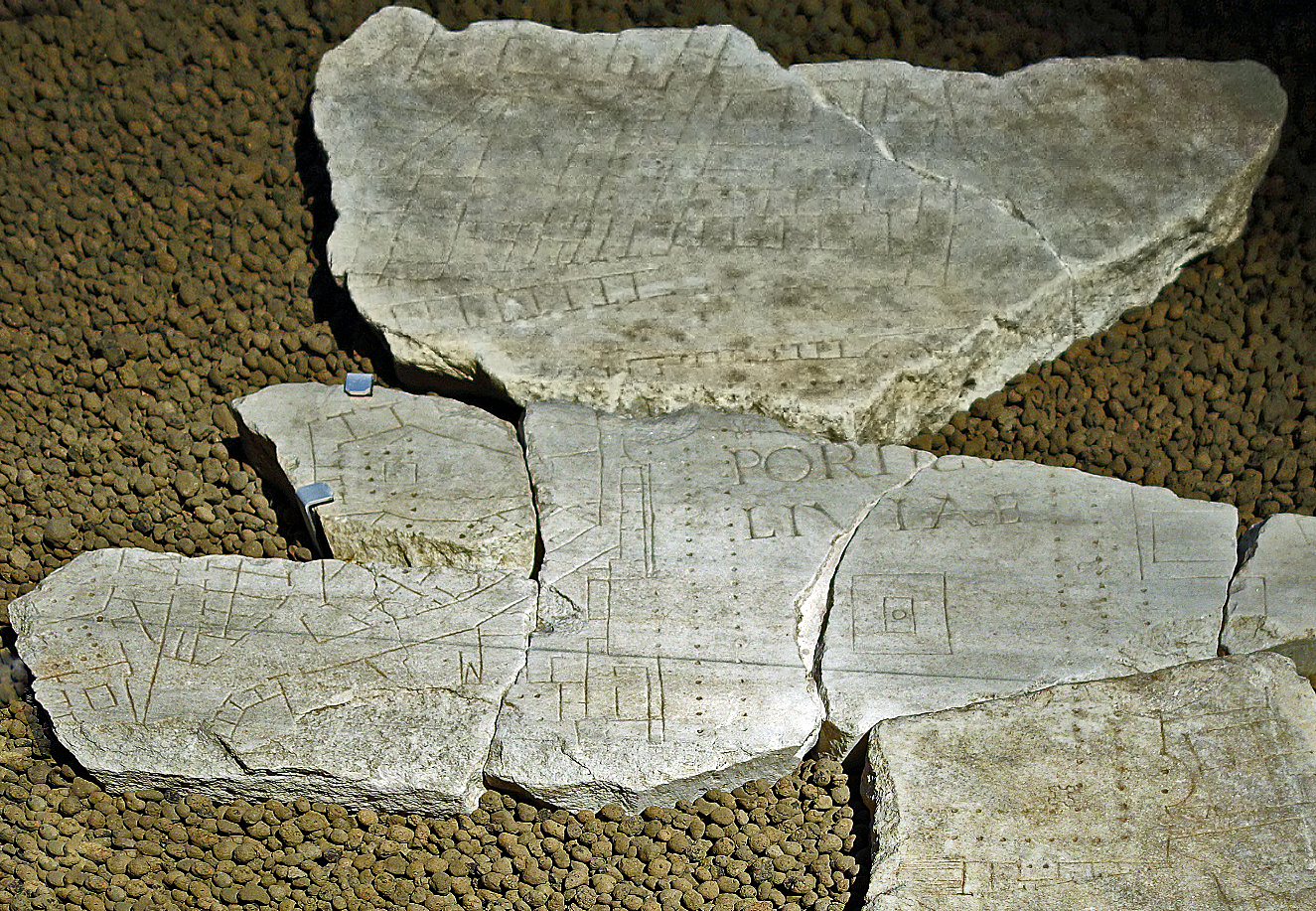 Forma Urbis : quartier du Portique de Livie (Porticus Liviae). Palais des Conservateurs, Rome.